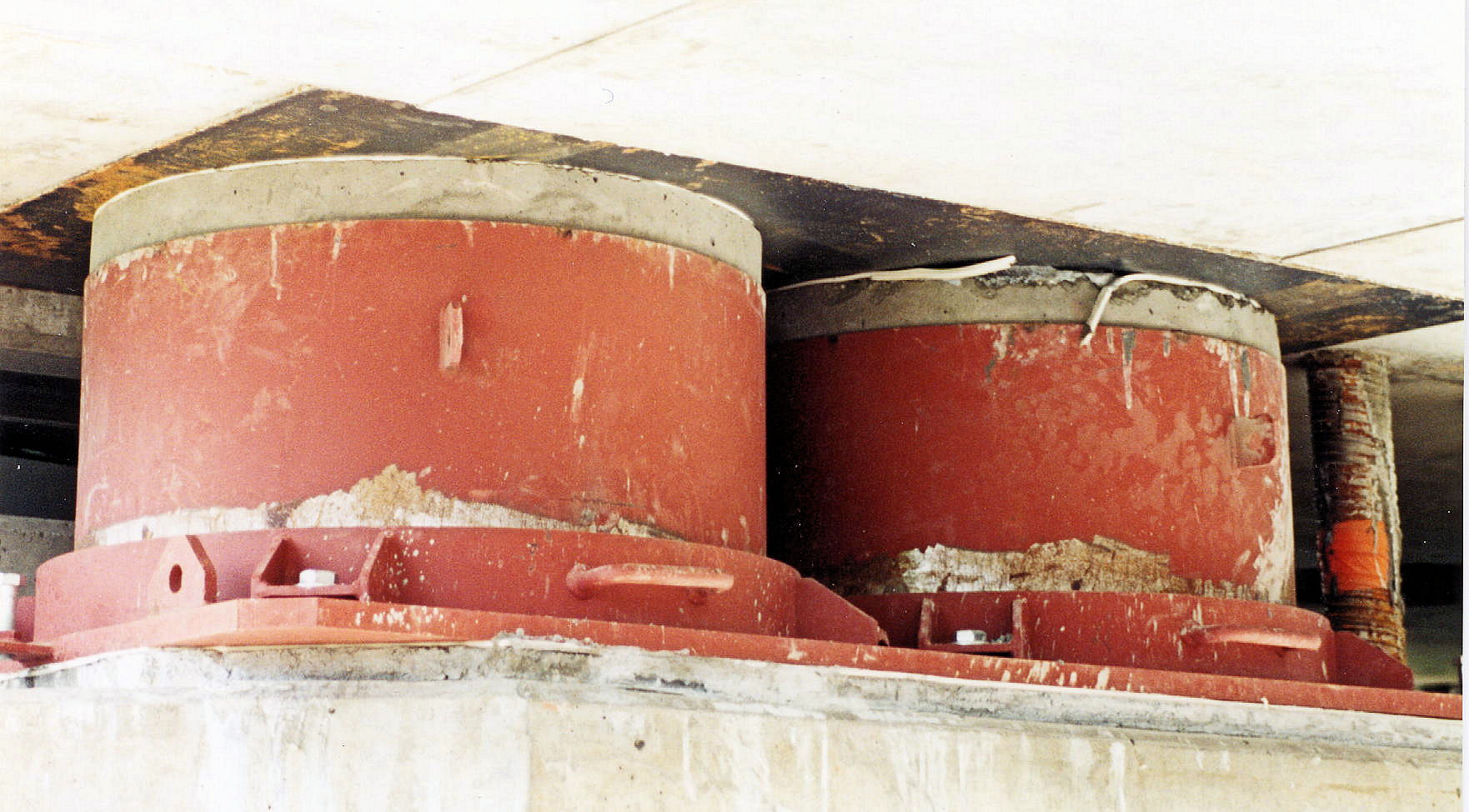 Viaduc de La Barricade - Boîtes à sable servant d'appuis provisoires pendant la construction du fléau sur la pile P1